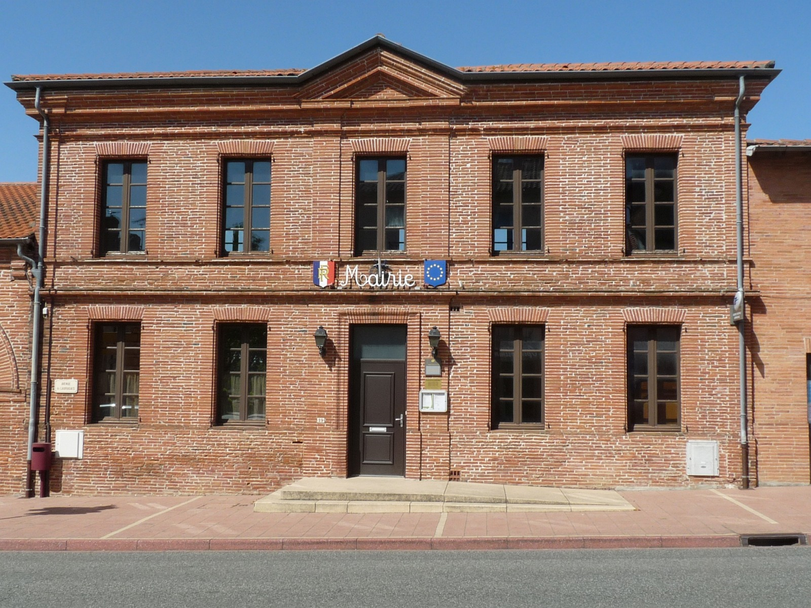 Mairie de Labastide-Beauvoir, Haute-Garonne, France